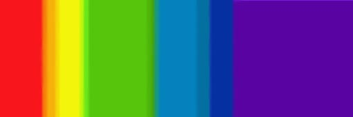 spectre continu non-linéaire visible dans un spectroscope à prismes